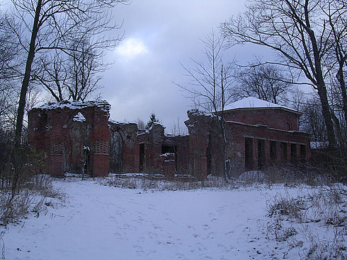 Баболовский дворец со стороны парка в 2006 году